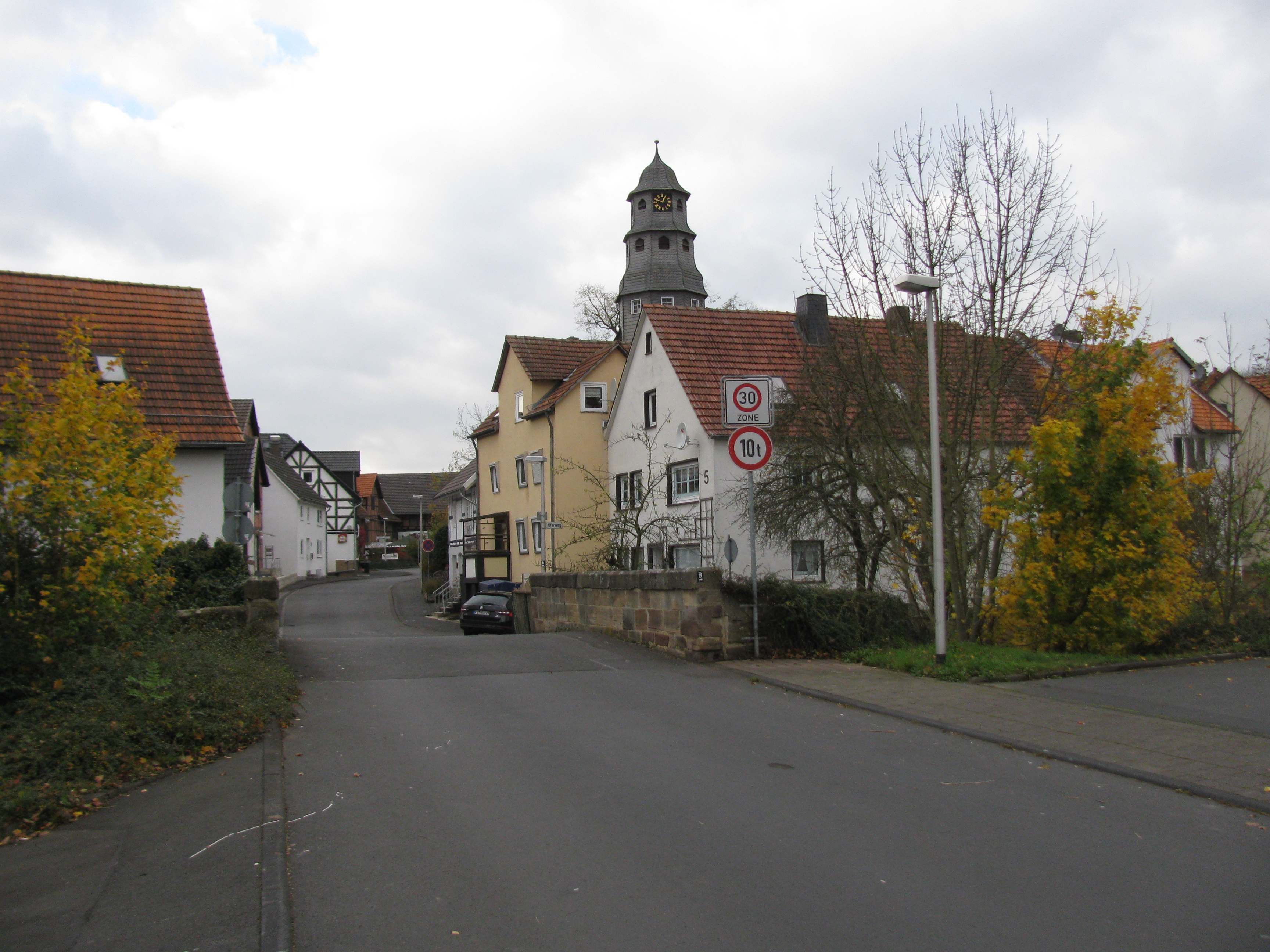 die Brücke der Altenbaunaer Straße über die Bauna in Altenritte